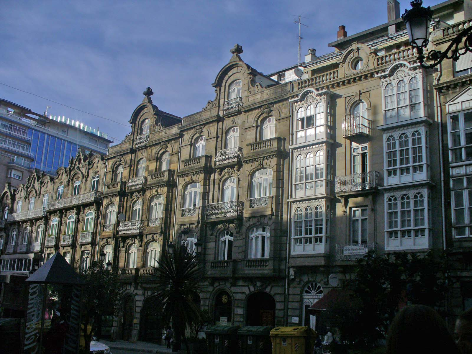 Loghdomoj en strato Urzáiz, Vigo. Verko de Michel Paczevich.